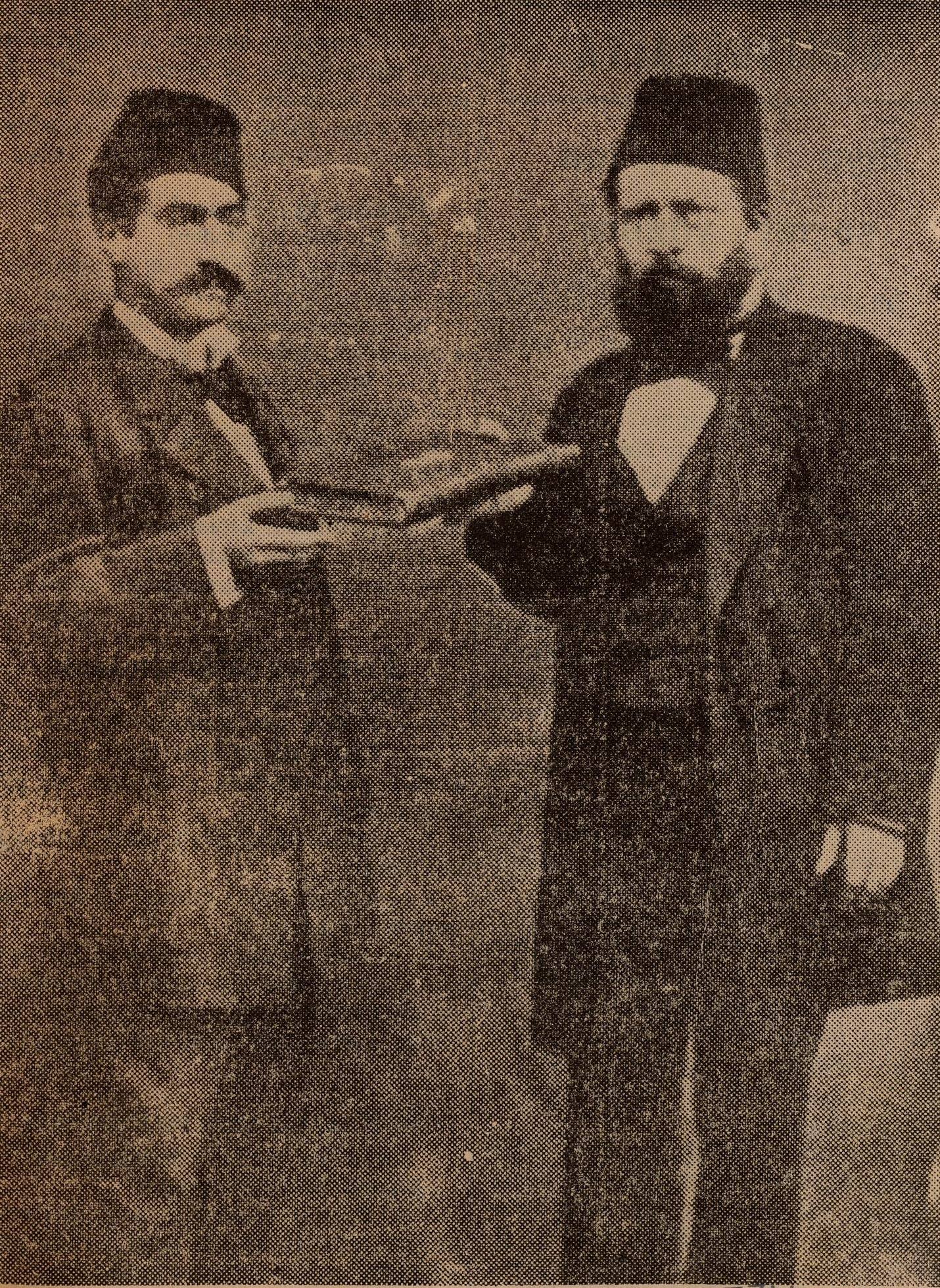 Namık Kemal (sağ), dostu Hikmet ile birlikte.